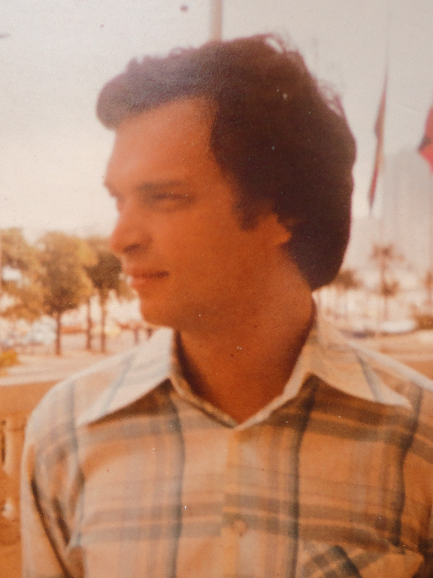 Gyula Sax, Interzonenturnier 1979 in Rio de Janeiro.